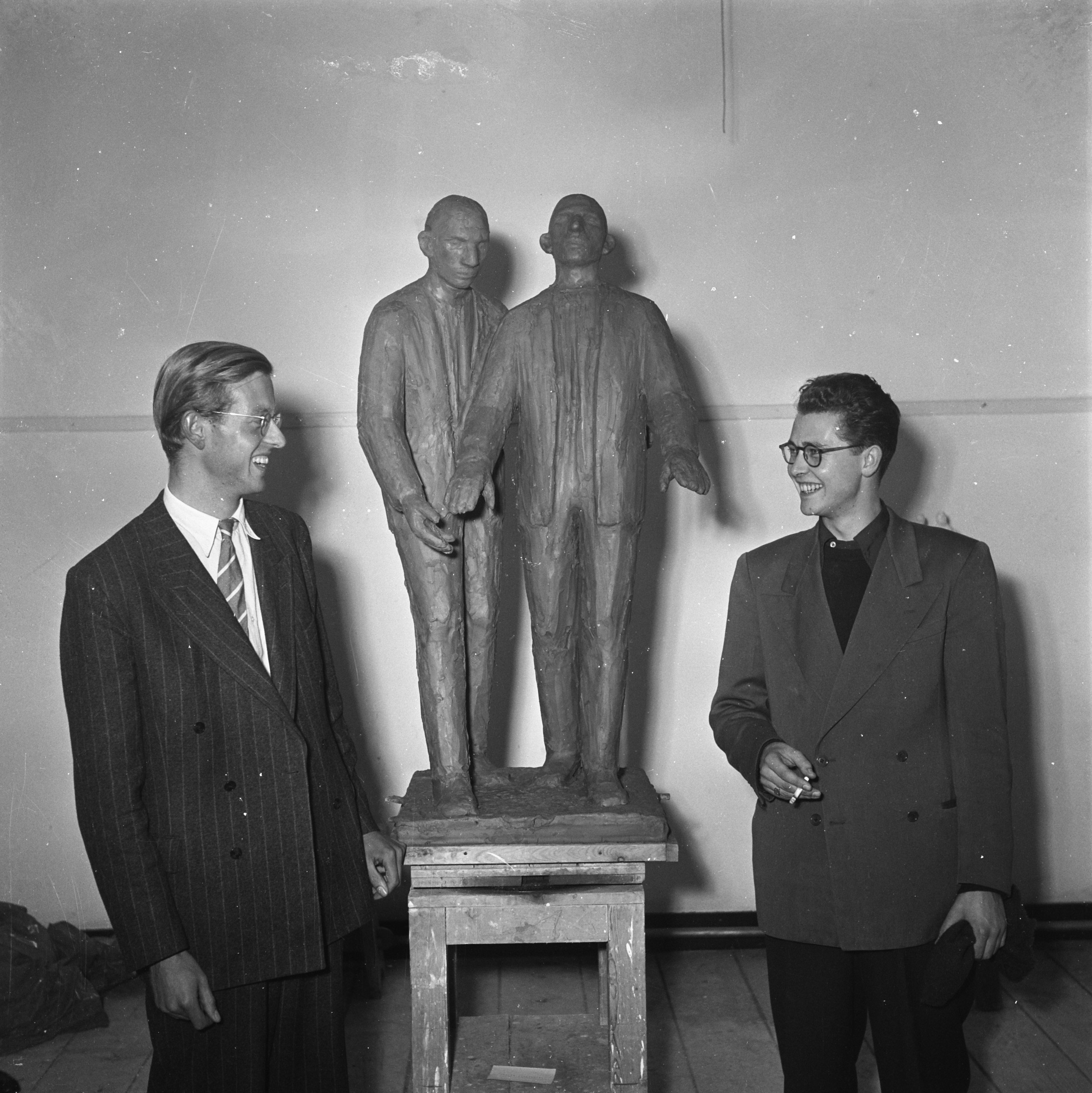 Collectie / Archief : Fotocollectie Anefo Reportage / Serie : [ onbekend ] Beschrijving : Prix de Rome beeldende kunsten te Amsterdam. Winnaar monumentale beeldhouwkunst Auke. Hettema (links). Rechts Hans IJdo, de winnaar van het zilver Annotatie : Beeldhouwer Auke Hettema (1927-2004) won de Prix de Rome Beeldhouwkunst in 1951. De opdracht was een gedenkteken ter nagedachtenis aan een oogarts. Het beeld moest uit twee personen bestaan, een blinde en een ziende (bron: website Prix de Rome Datum : 2 oktober 1951 Locatie : Amsterdam, Noord-Holland Trefwoorden : beeldhouwers, beeldhouwkunst, beeldhouwwerken, prijsuitreikingen Persoonsnaam : Hettema, Auke, IJdo, Hans Instellingsnaam : Prix de Rome Fotograaf : Noske, J.D. / Anefo Auteursrechthebbende : Nationaal Archief Materiaalsoort : Negatief (zwart/wit) Nummer archiefinventaris : bekijk toegang 2.24.01.03 Bestanddeelnummer : 904-7872